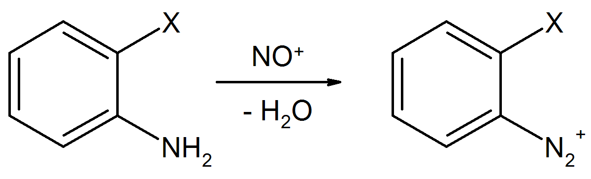 Diazotierung